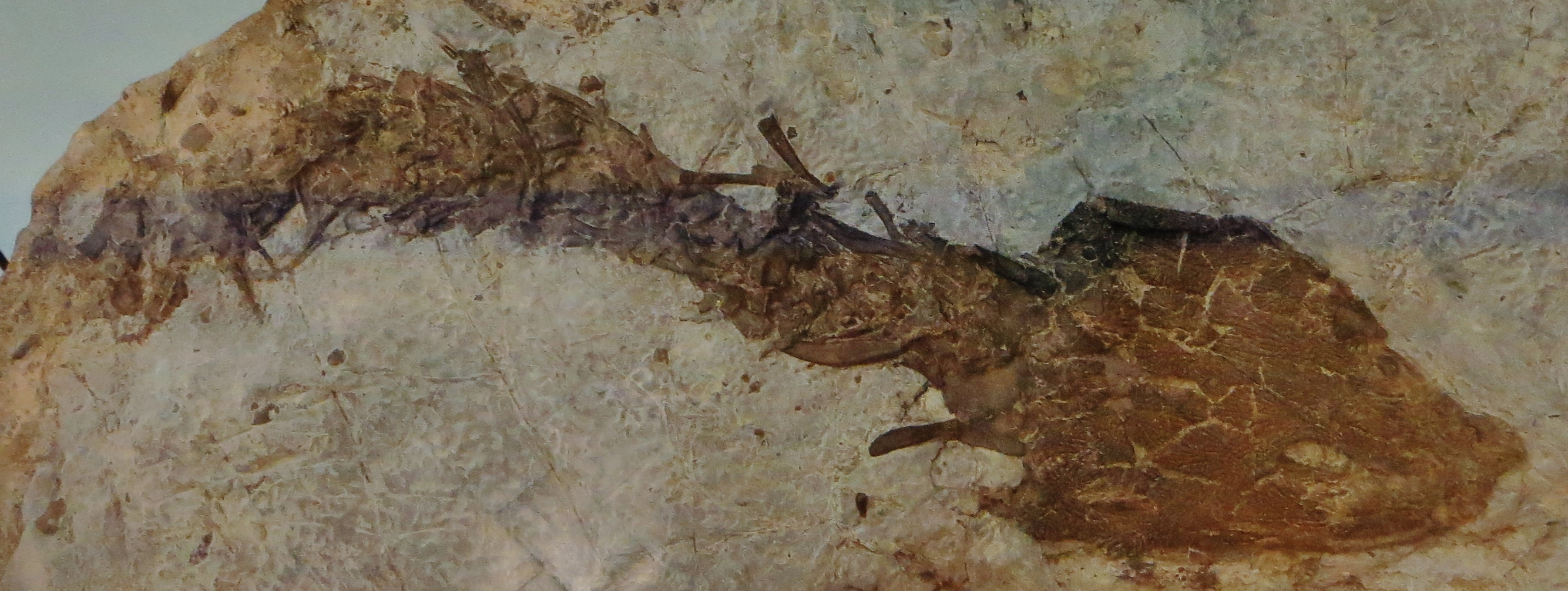 Fossil of Callistomordax- Took the picture at Museum am Lowentor, Stuttgard